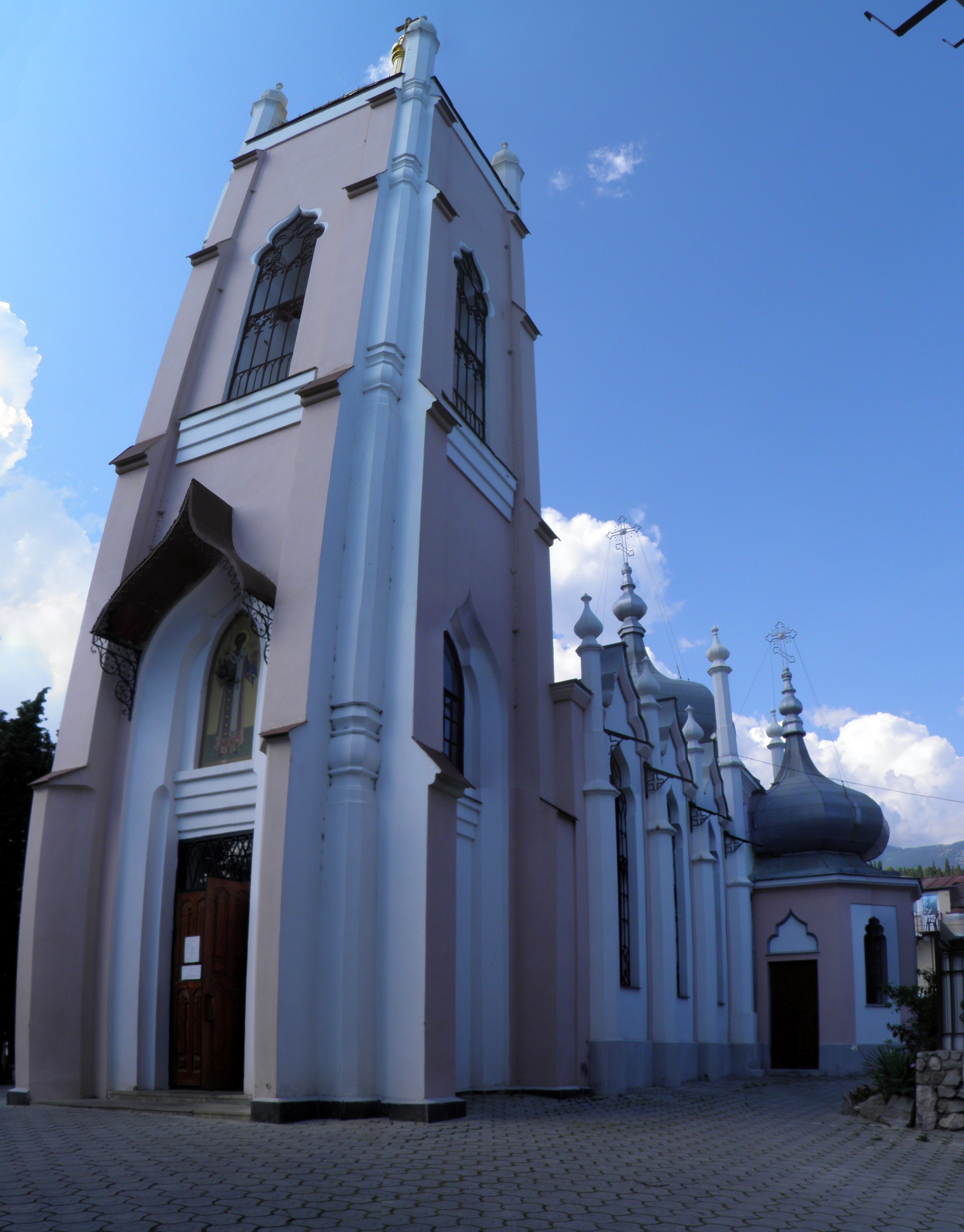 Дзвіниця колишньої церкви Івана Златоуста, Ялта, вул. Толстого, 10